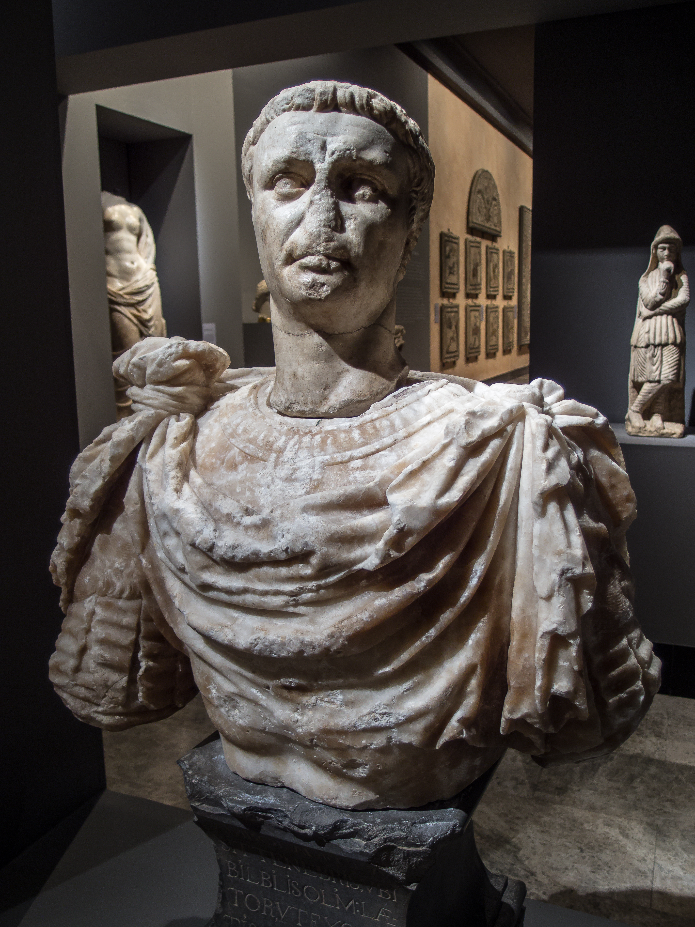 Busto anticoromano dell'imperatore Claudio, nella Sección de Arqueología del Museo de Zaragoza.